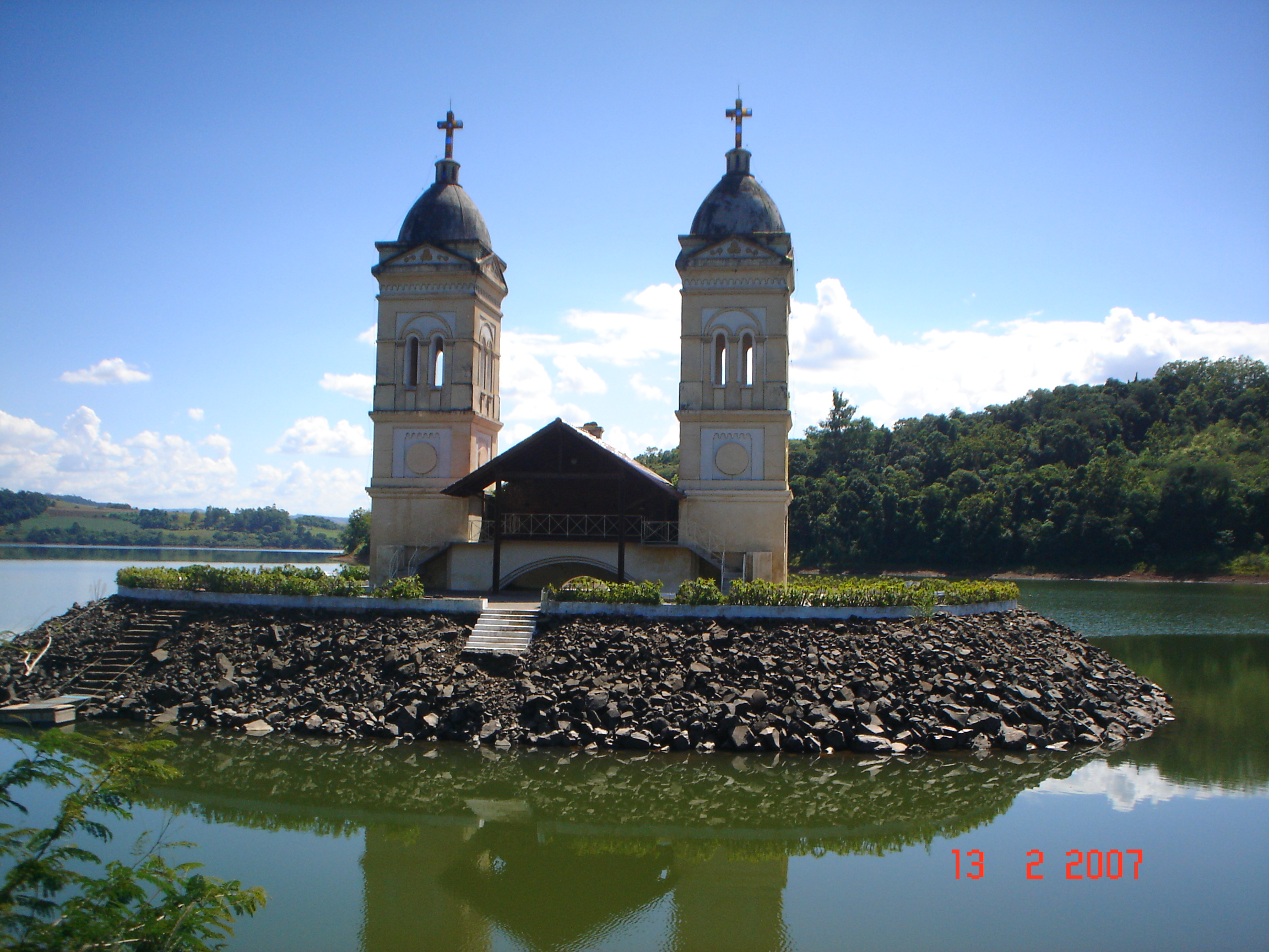 Torres da Igreja da cidade velha de Itá, Santa Catarina, Brasil.